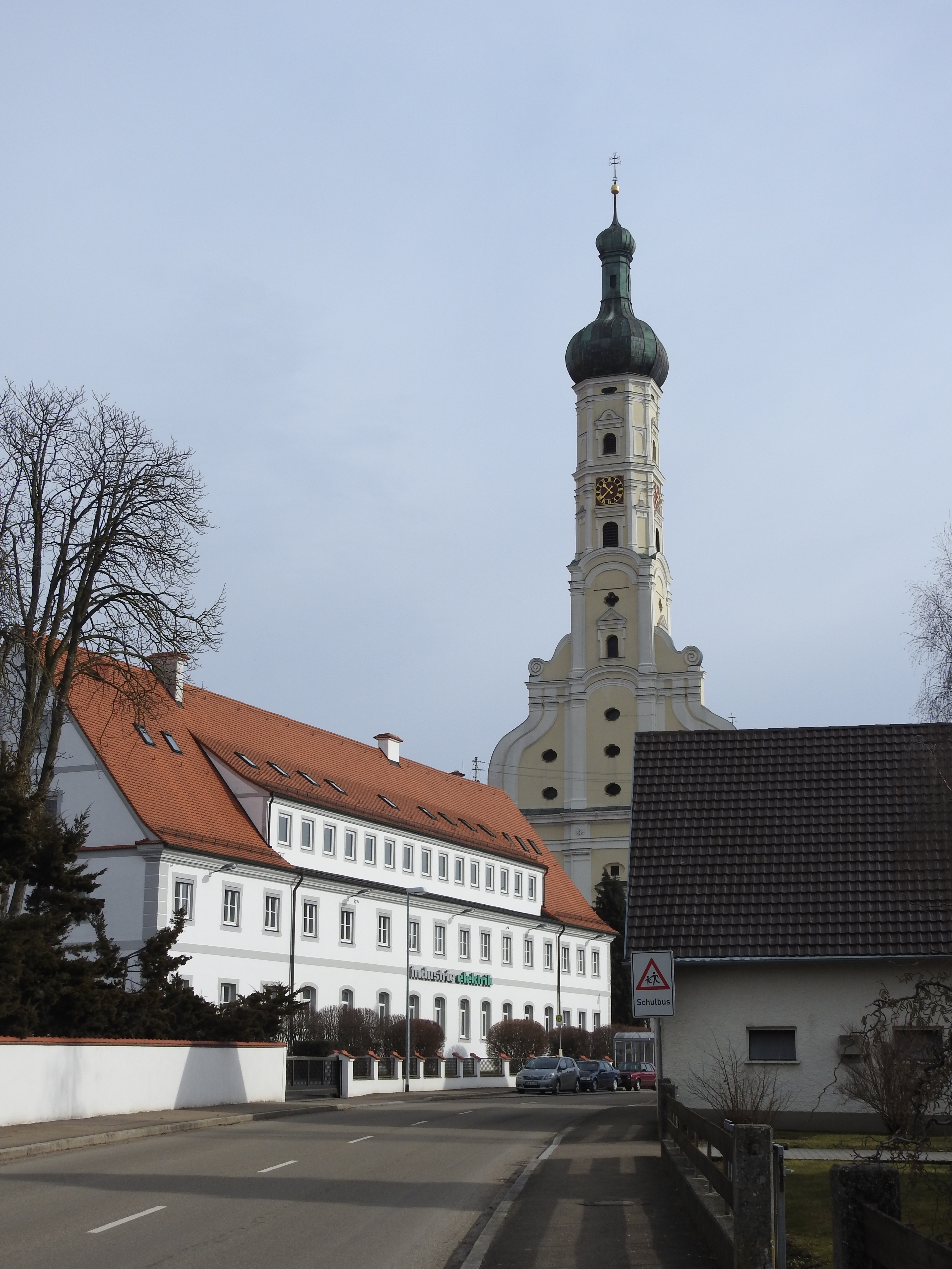 Hauptstr. in Obermedlingen, Medlingen